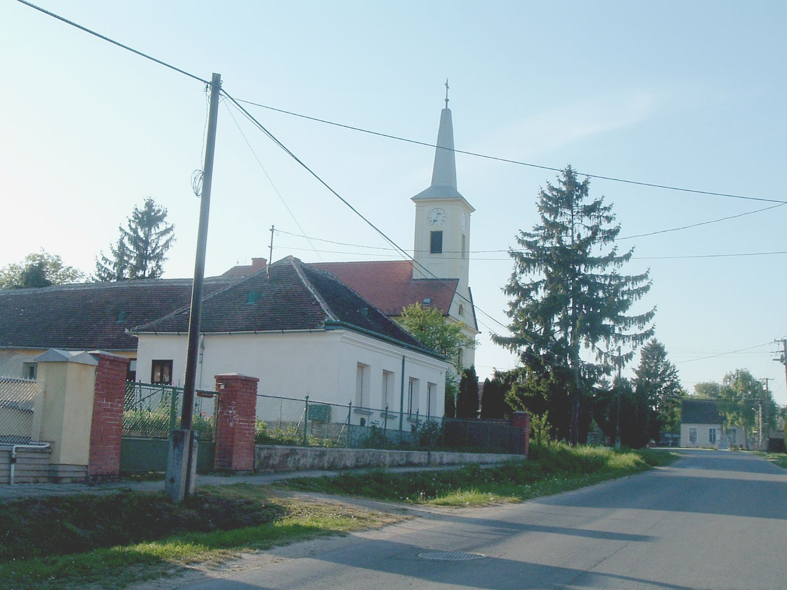 Nárai, Szent Tamás római katolikus templom